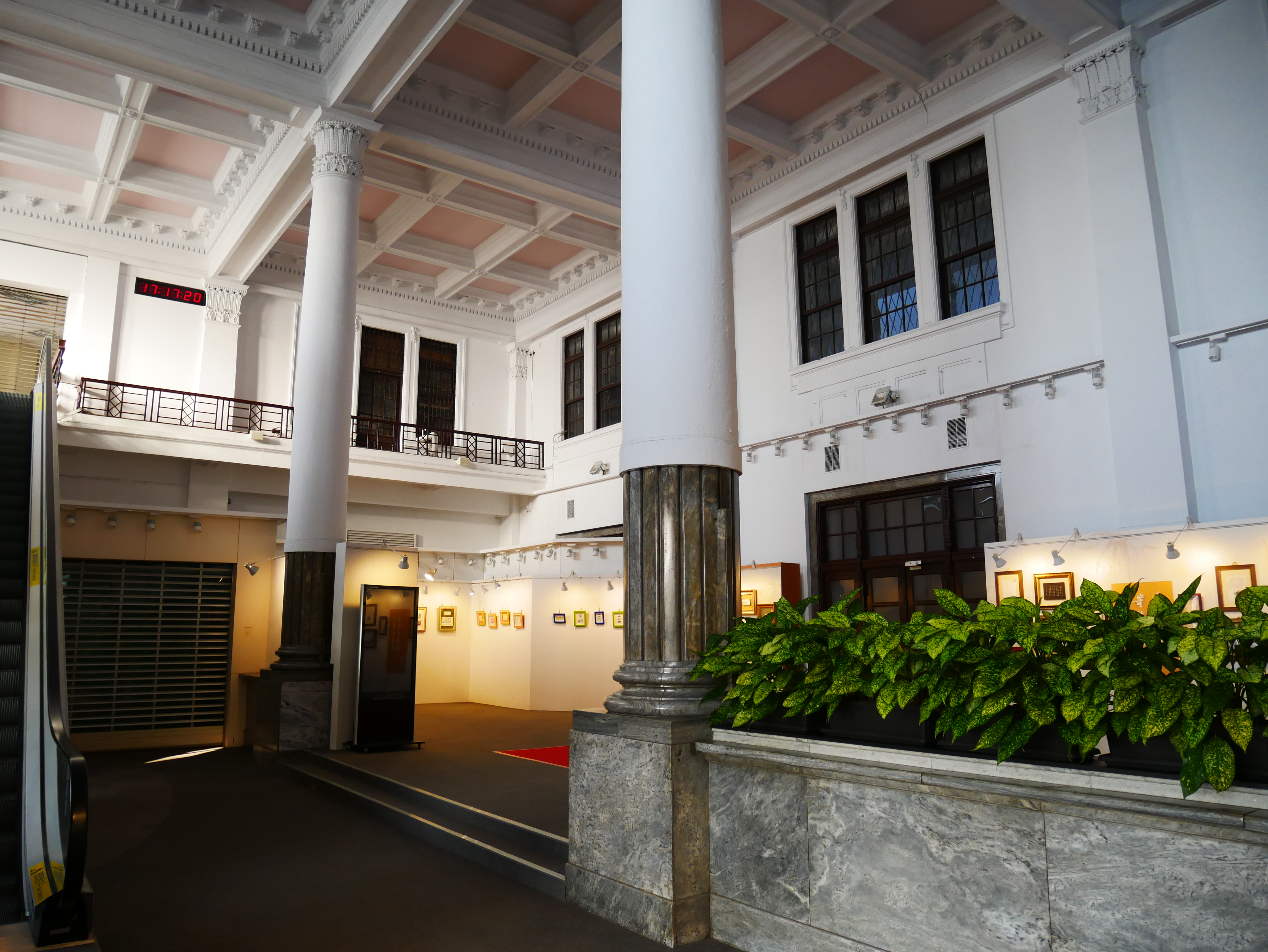 臺北郵局大廳，臺北市中正區城內次分區光復里